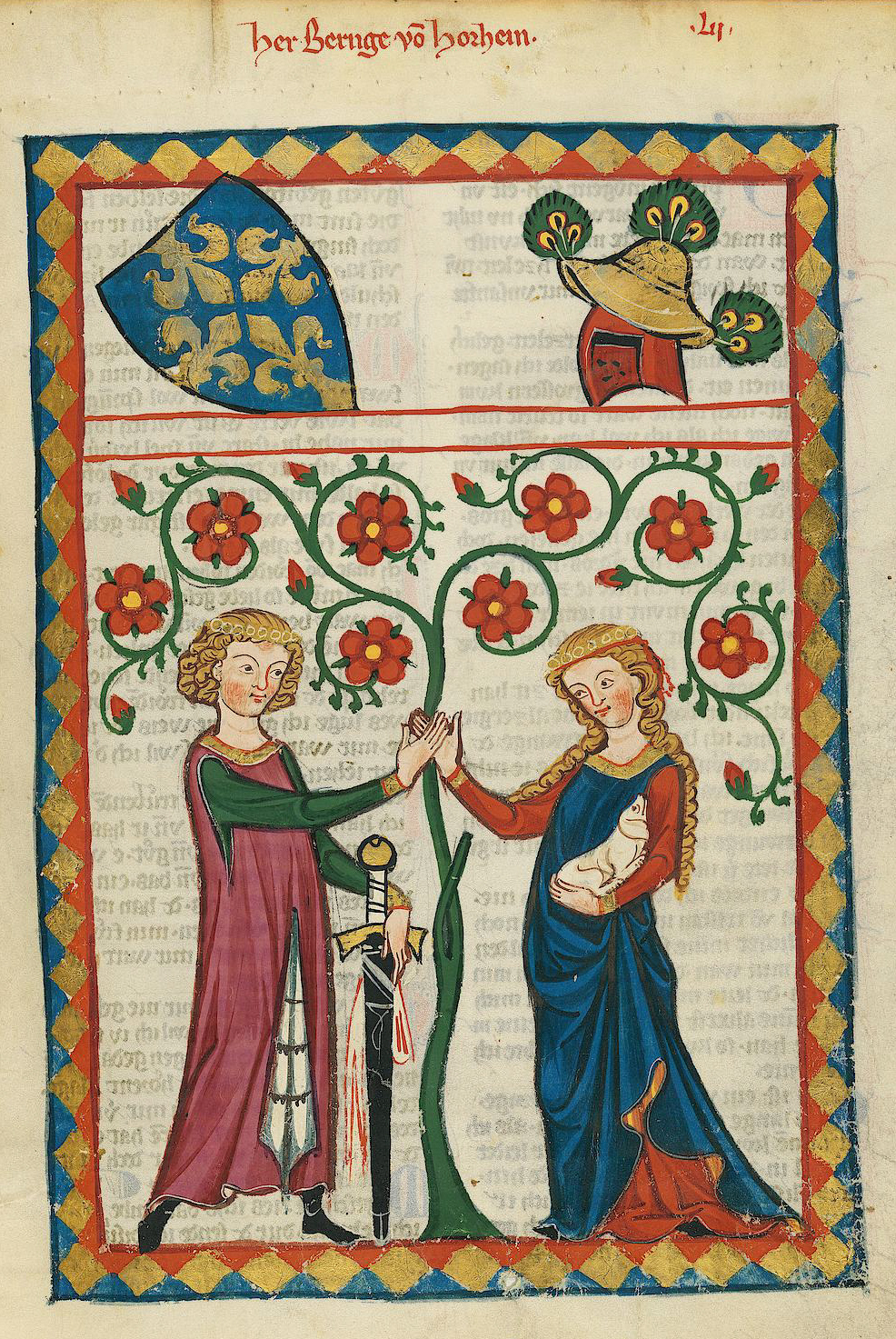 Codex Manesse, UB Heidelberg, Cod. Pal. germ. 848, fol. 178r: Herr Bernger von Horheim